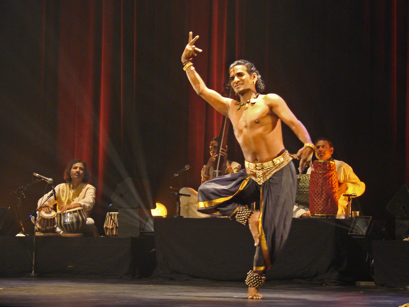 Spectacle de la compagnie Raghunath Manet à l'institut du monde arabe